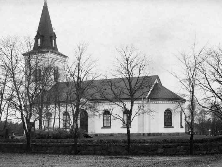 Hångers kyrka